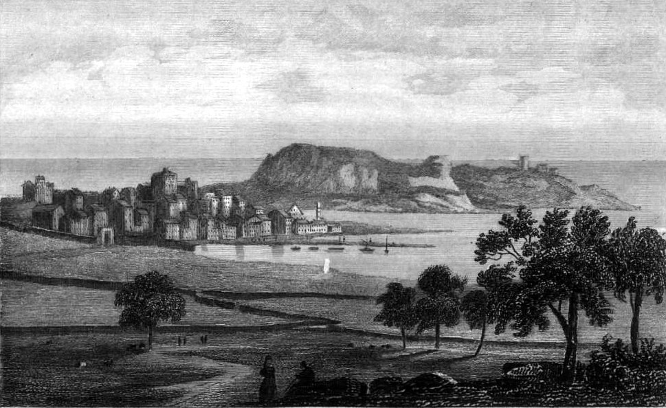 Image en provenance du livre : Eusèbe Girault de Saint-Fargeau, Guide pittoresque du voyageur en France, contenant la statistique et la description complète des quatre-vingt-six départements, orné de 740 vignettes et portraits gravés sur acier, de quatre-vingt-six cartes de départements et d'une grande carte routière de la France, par une Société de gens de lettres, de géographes et d'artistes, Paris, F. Didot frères, 1838, 6 volumes in-8° (BNF : 8-L25- 46). Volume III Didot frères, 1838. Route de Paris à Nice traversant les départements de l'Isère, des Hautes-Alpes, des Basses-Alpes et du Var. auteurs dessins : Rauch (ou autre) auteurs gravures : Skelton fils, Schroeder, Bishop (ou autre)